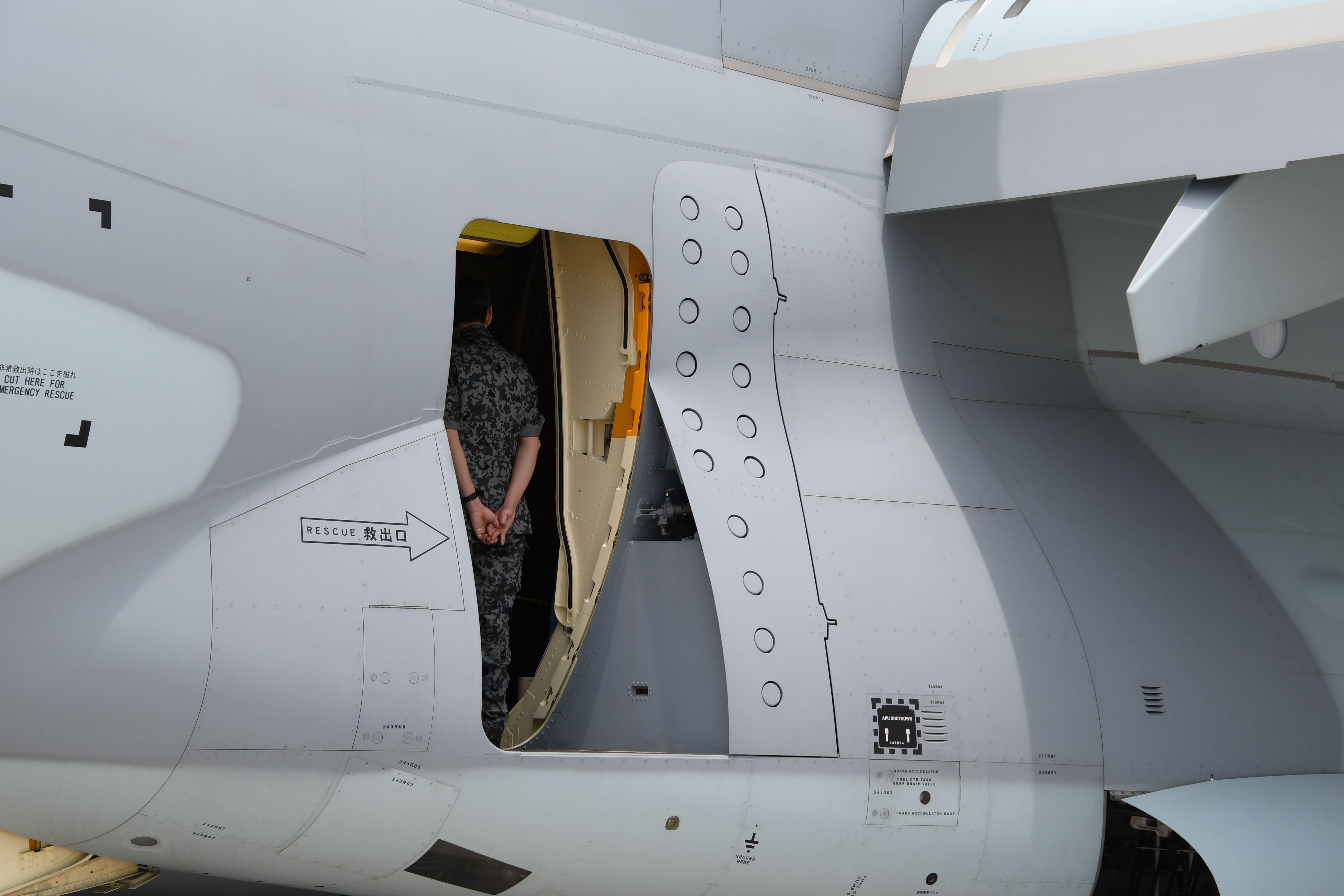 航空自衛隊 C-2輸送機（88-1207号機） 右側空挺扉 右後部。2018年5月27日 美保基地にて。